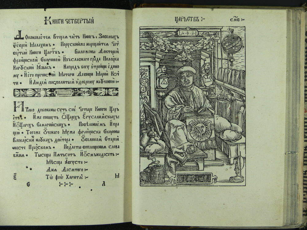 Беларуская (тарашкевіца): Гравюра з чацьвёртай Кнігі Царстваў, выдадзенай Скарынай у 1518 годзе